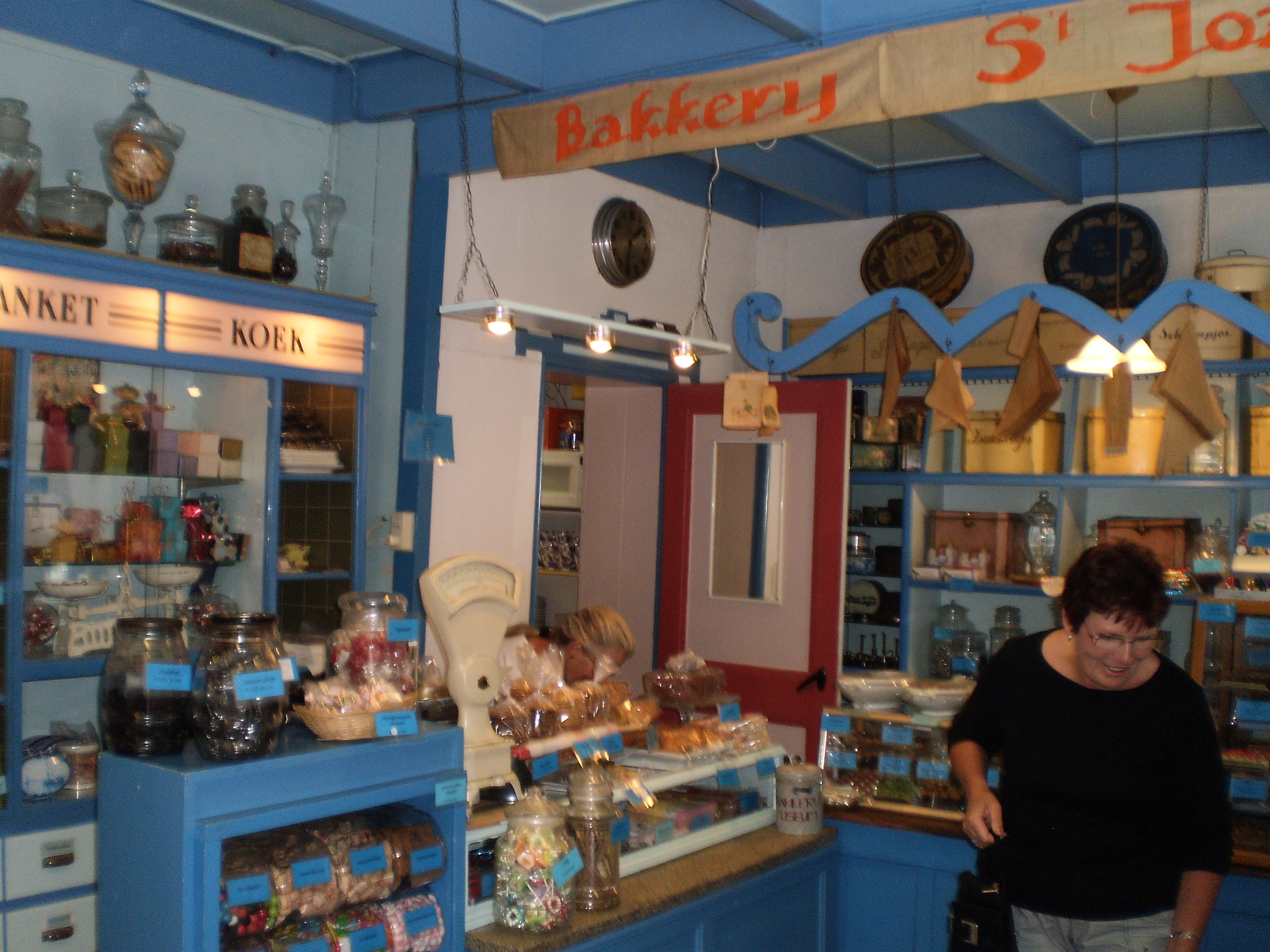 Ofbyld oanbean troch Swarte Kees op 14 augustus 2009